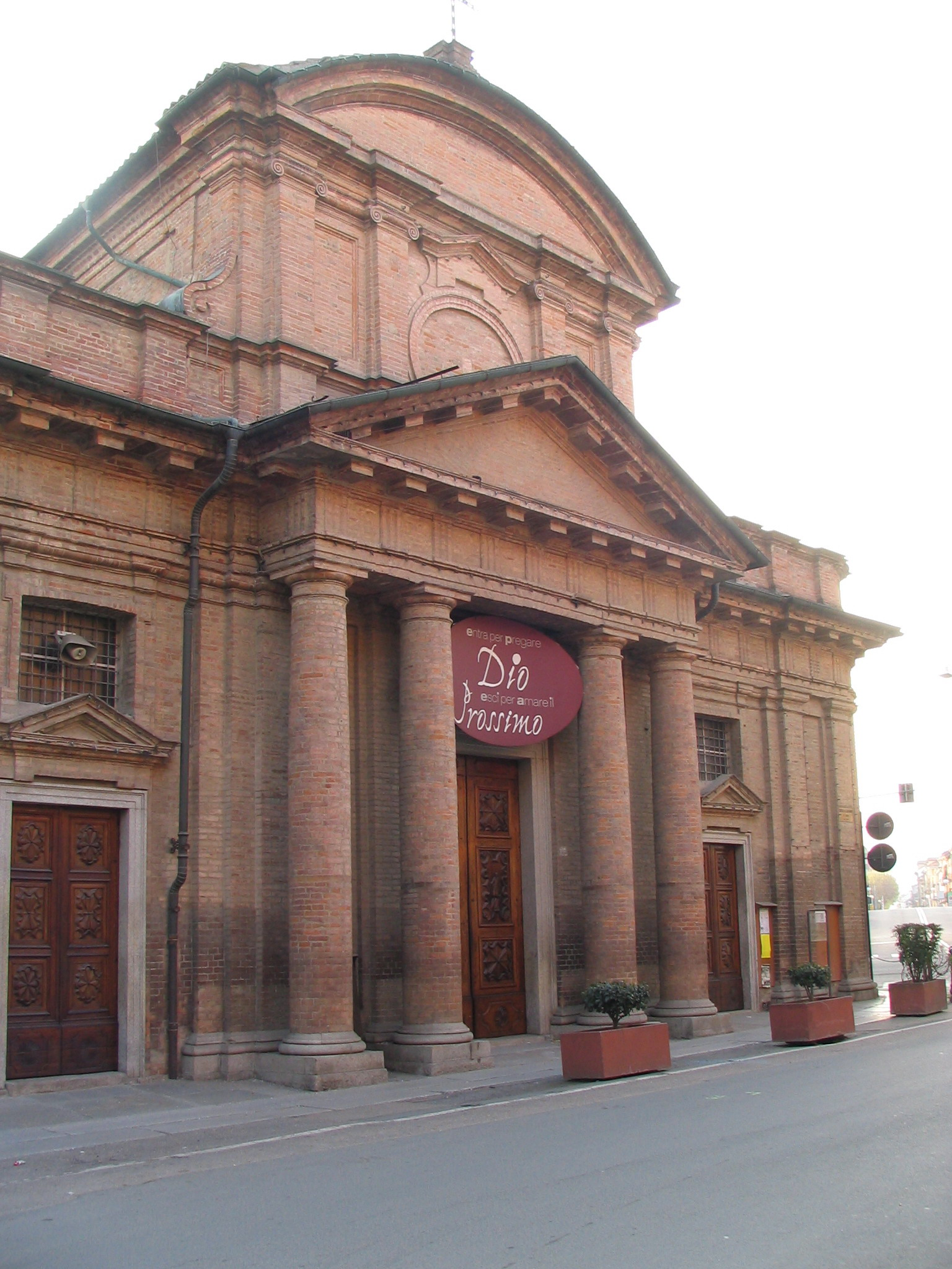 Nizza (Asti)San Giovanni in Lanero church